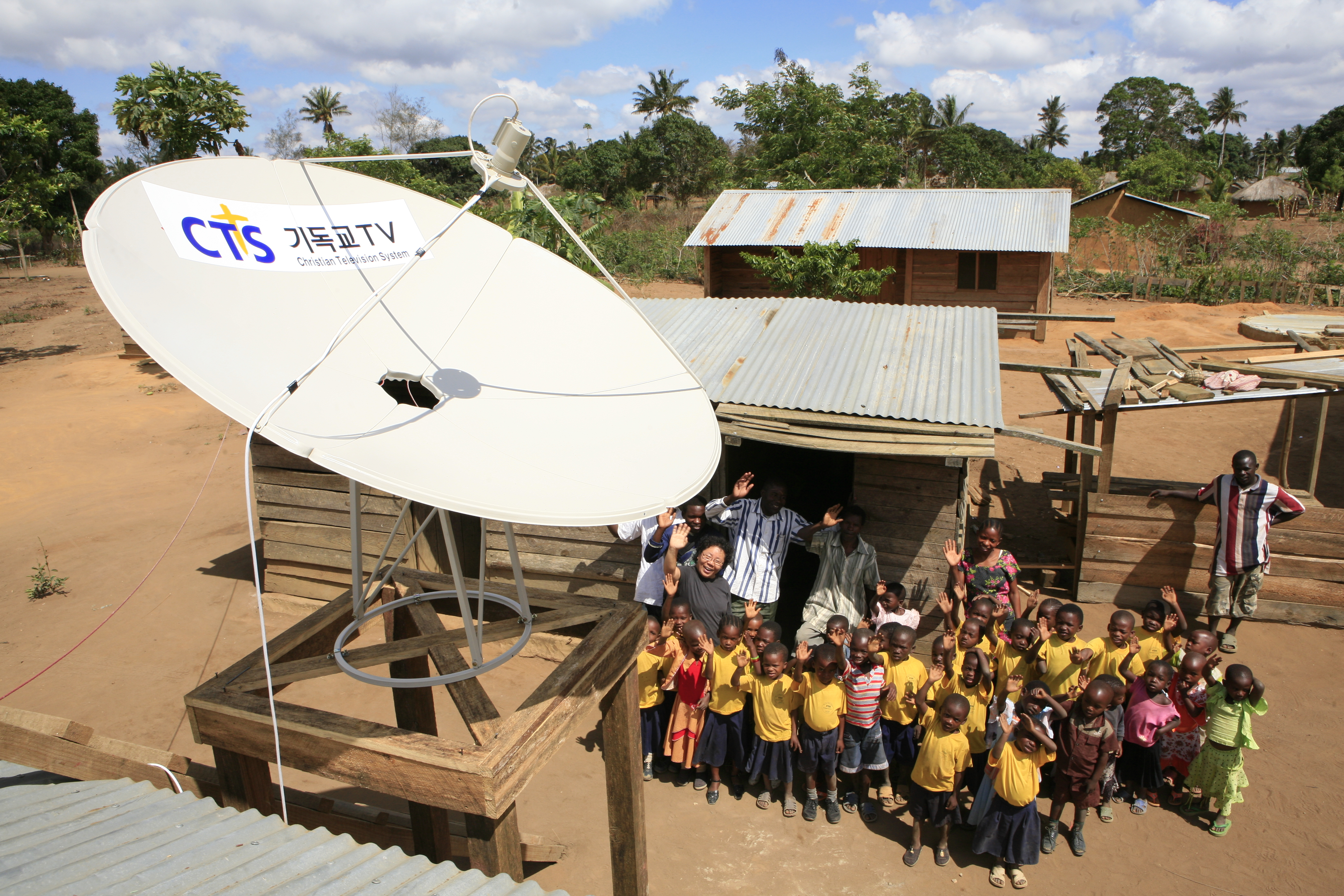 CTS 해외선교: 탄자니아 위성 설치